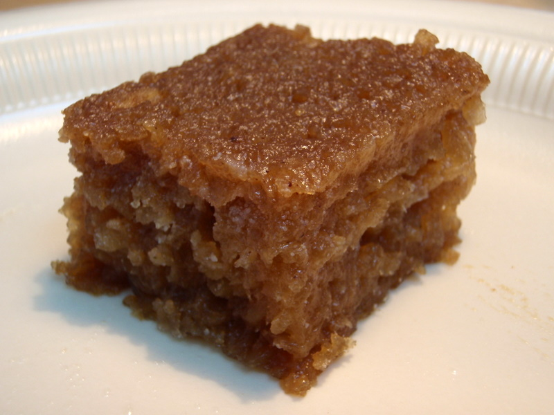 Cassava cake